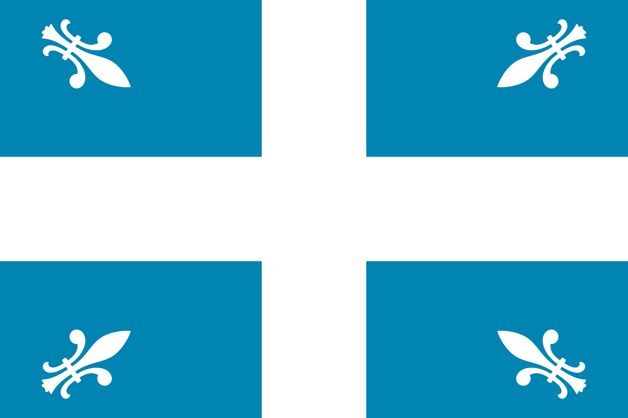 Drapeau de Carillon adapté par Eugene Filiatrault en 1902